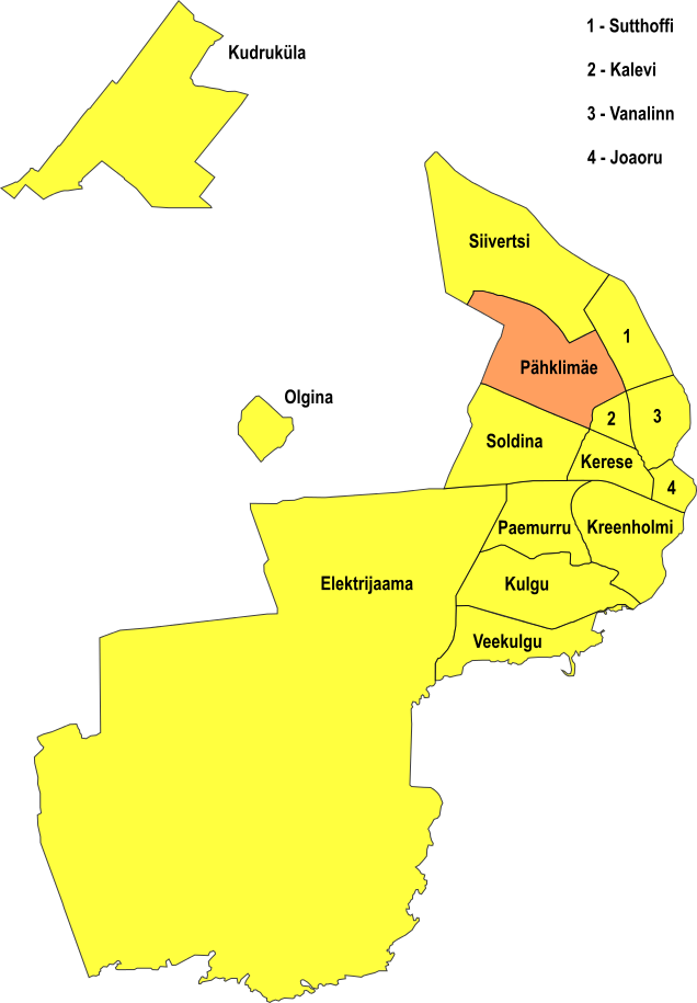 Narva linnaosa Pähklimäe